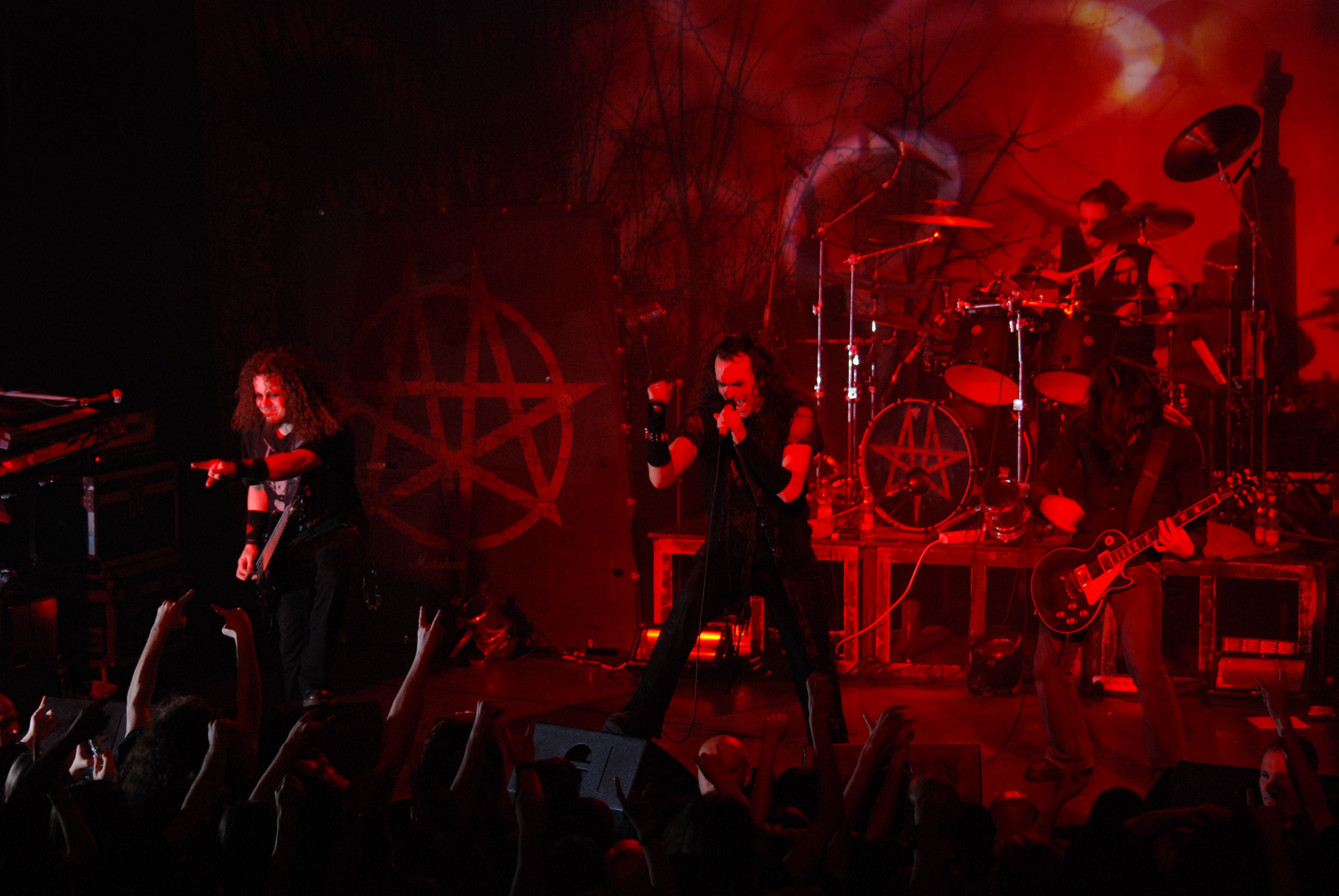 Koncert Moonspell'a w klubie Studio w Krakowie